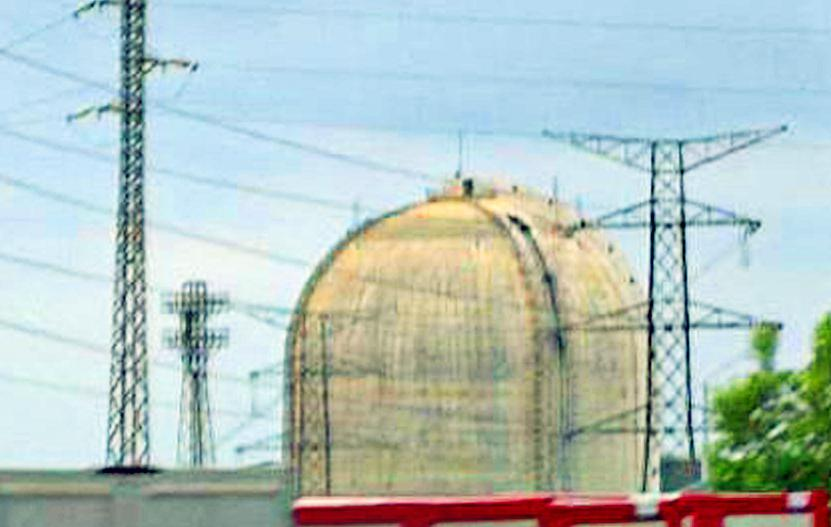 Central Nuclear de Vandellós. Tarragona, España